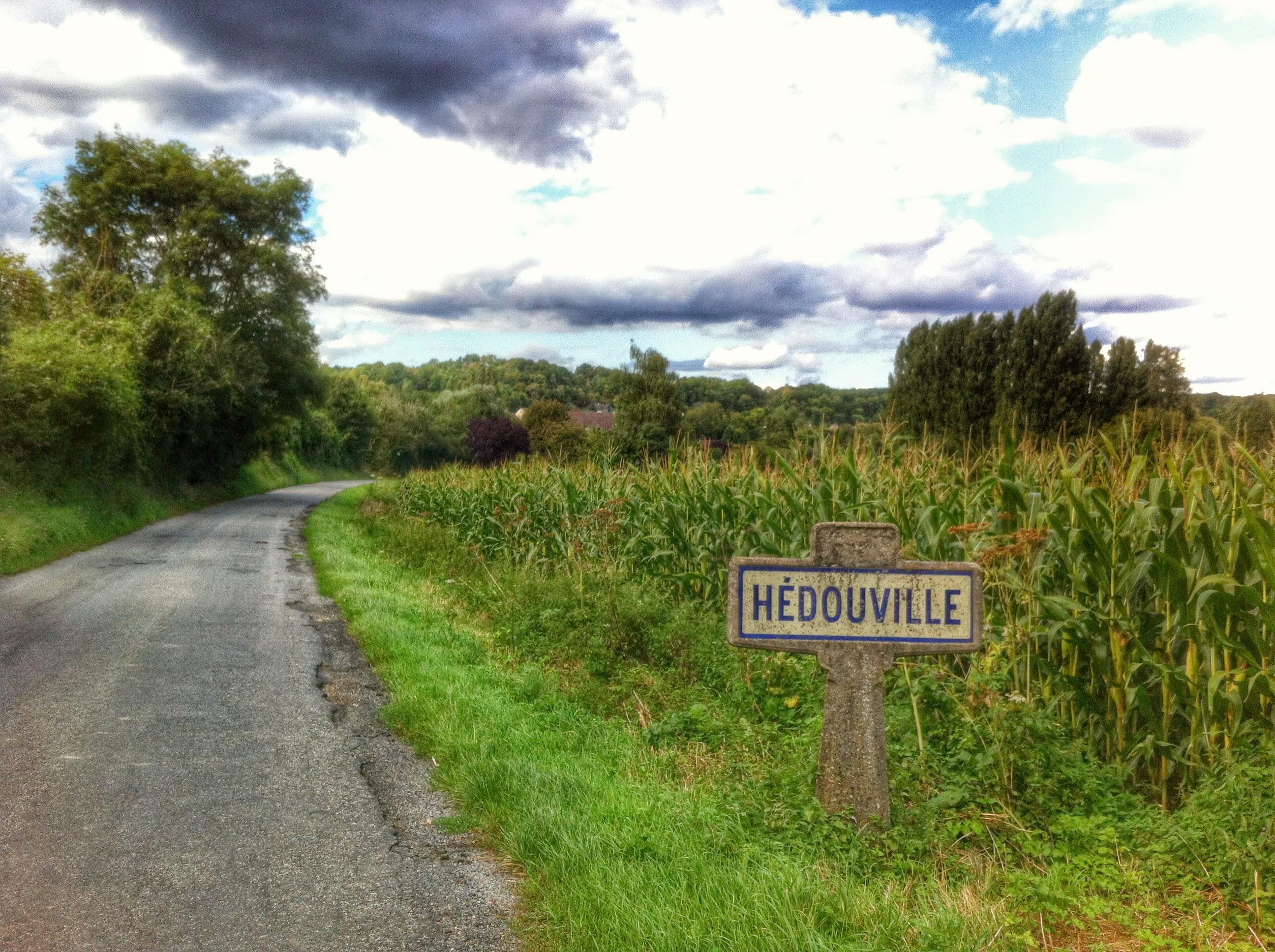 Panneau routier de l'entrée du village